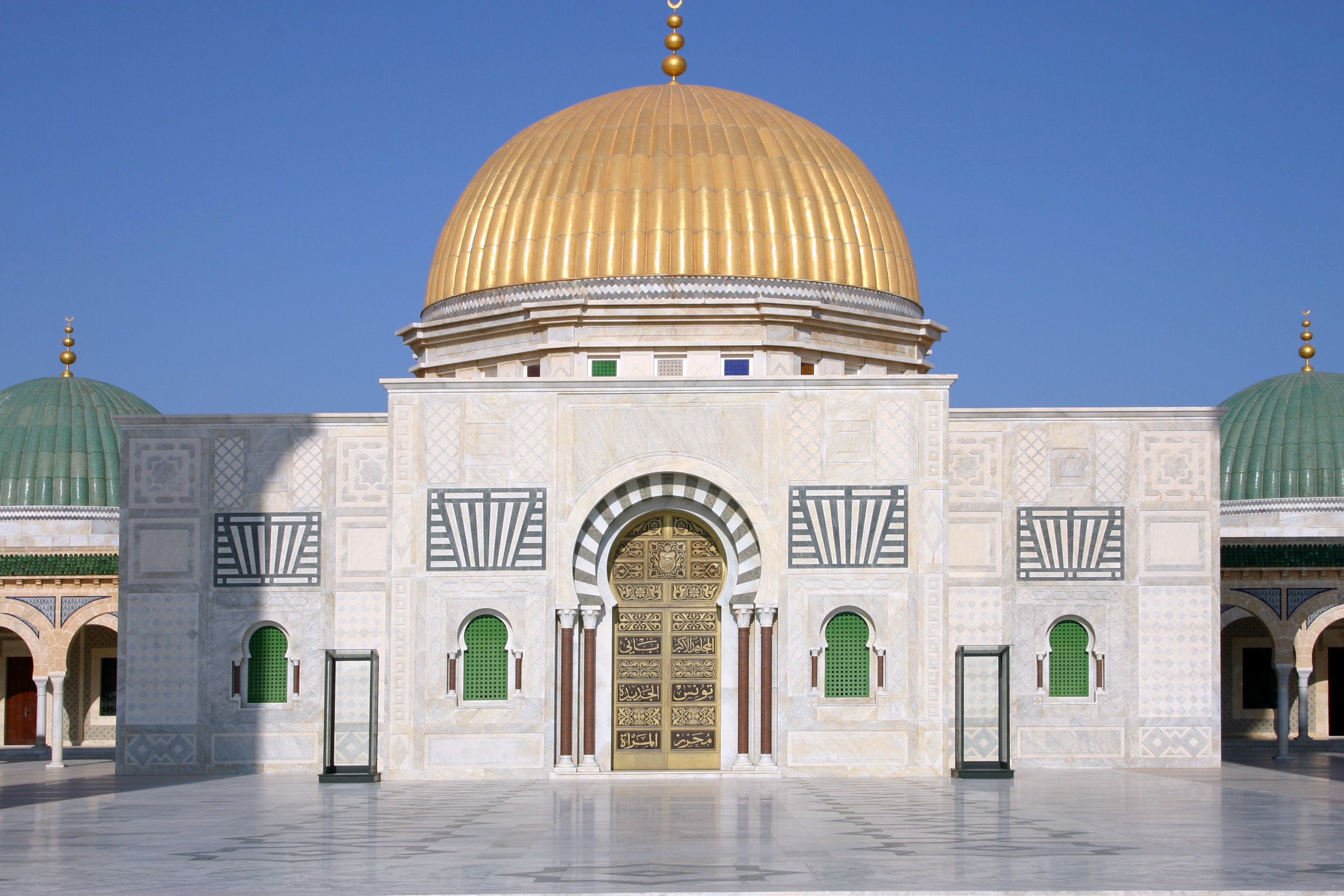 Mausoleum of Habib Bourguiba, Monastir, Tunisia.